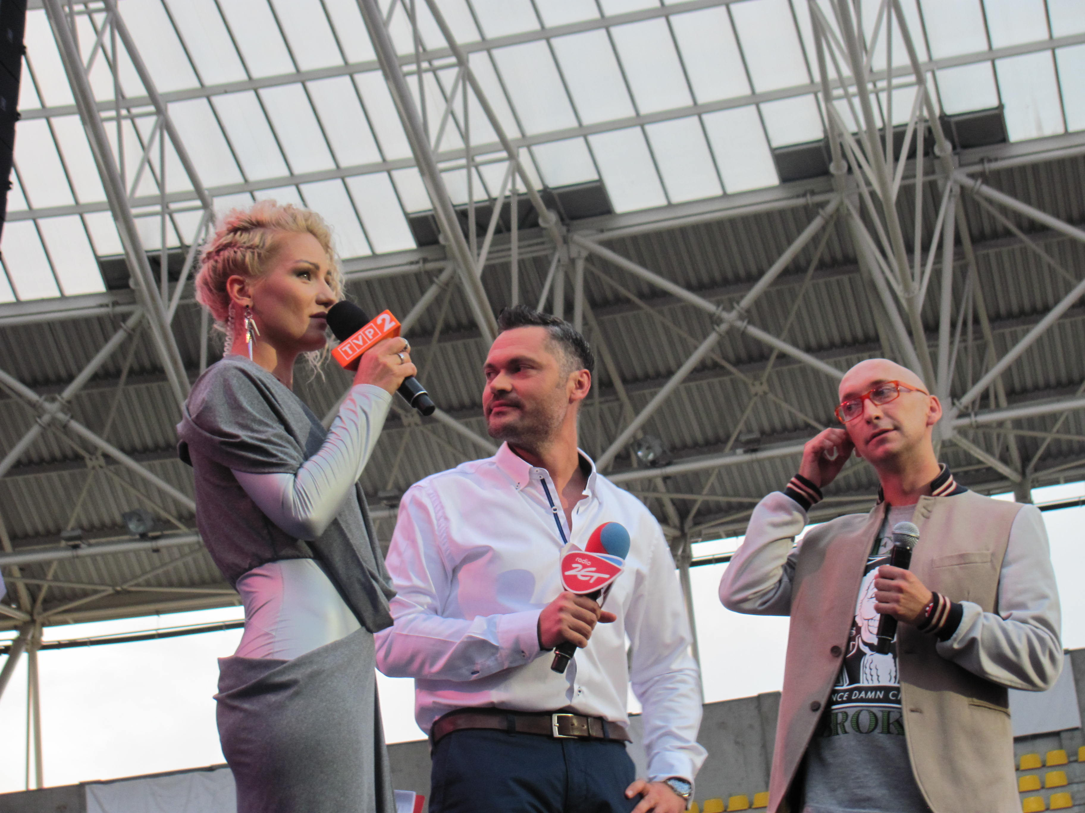 Koncert Lato Zet i Dwojki 2014 w Toruniu, od lewej: Marika, Rafał Olejniczak i Kamil Nosel.